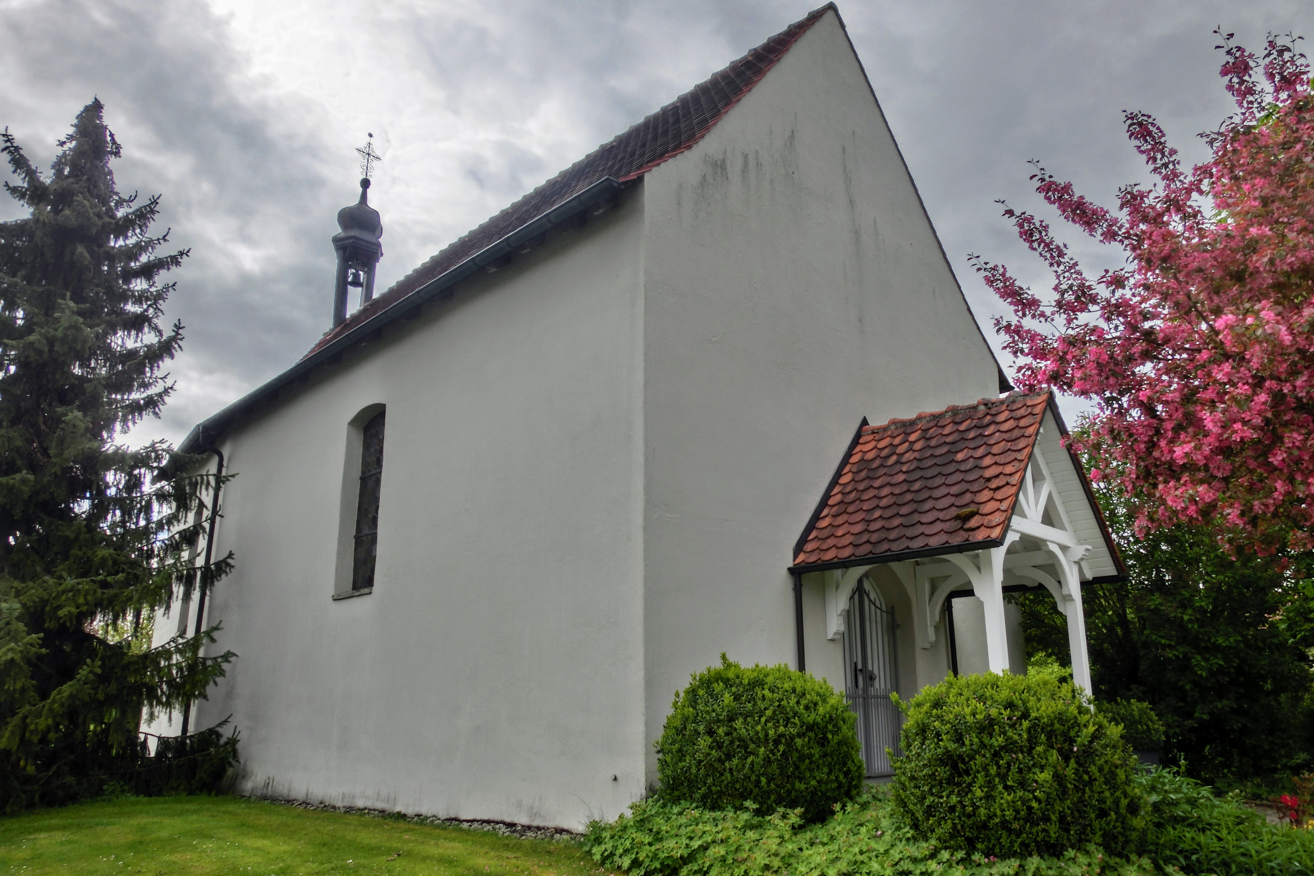 Deutschland (D) - Baden-Württemberg (BW) - Landkreis Konstanz (KN) - Mühlingen, Madachhof: Kapelle St. Otmar, Außenansicht